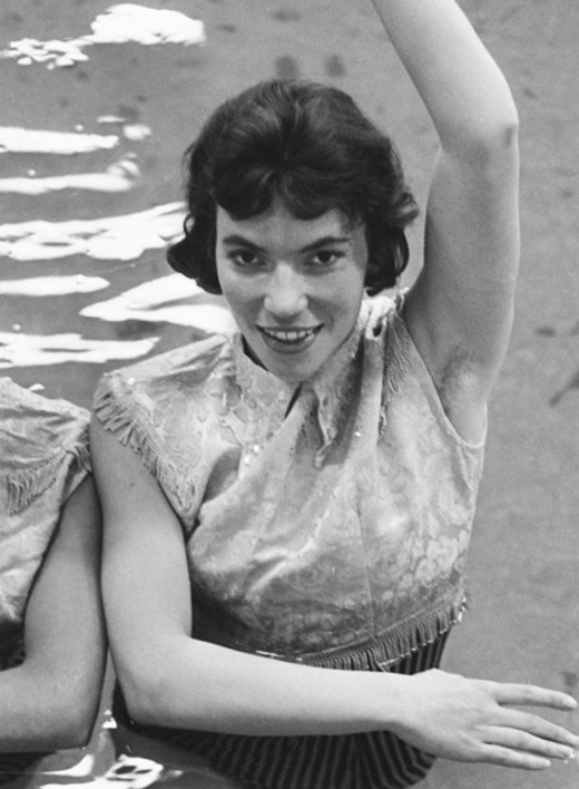 Hetty Balkenende. Kampioenschappen kunstzwemmen Deventer